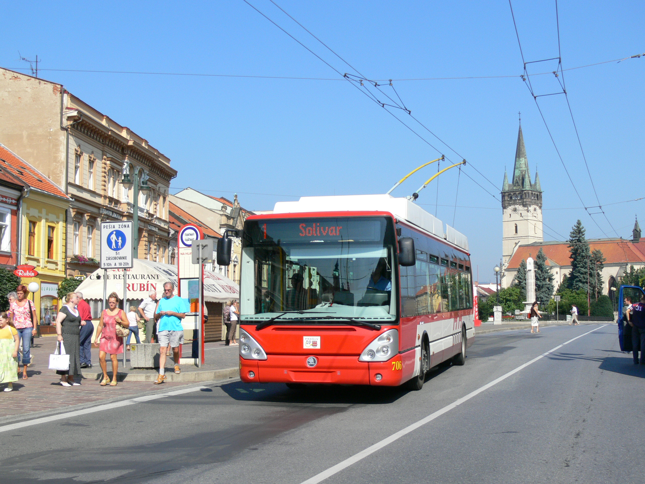 Skoda 24Tr, Hlavna ulica, Presov